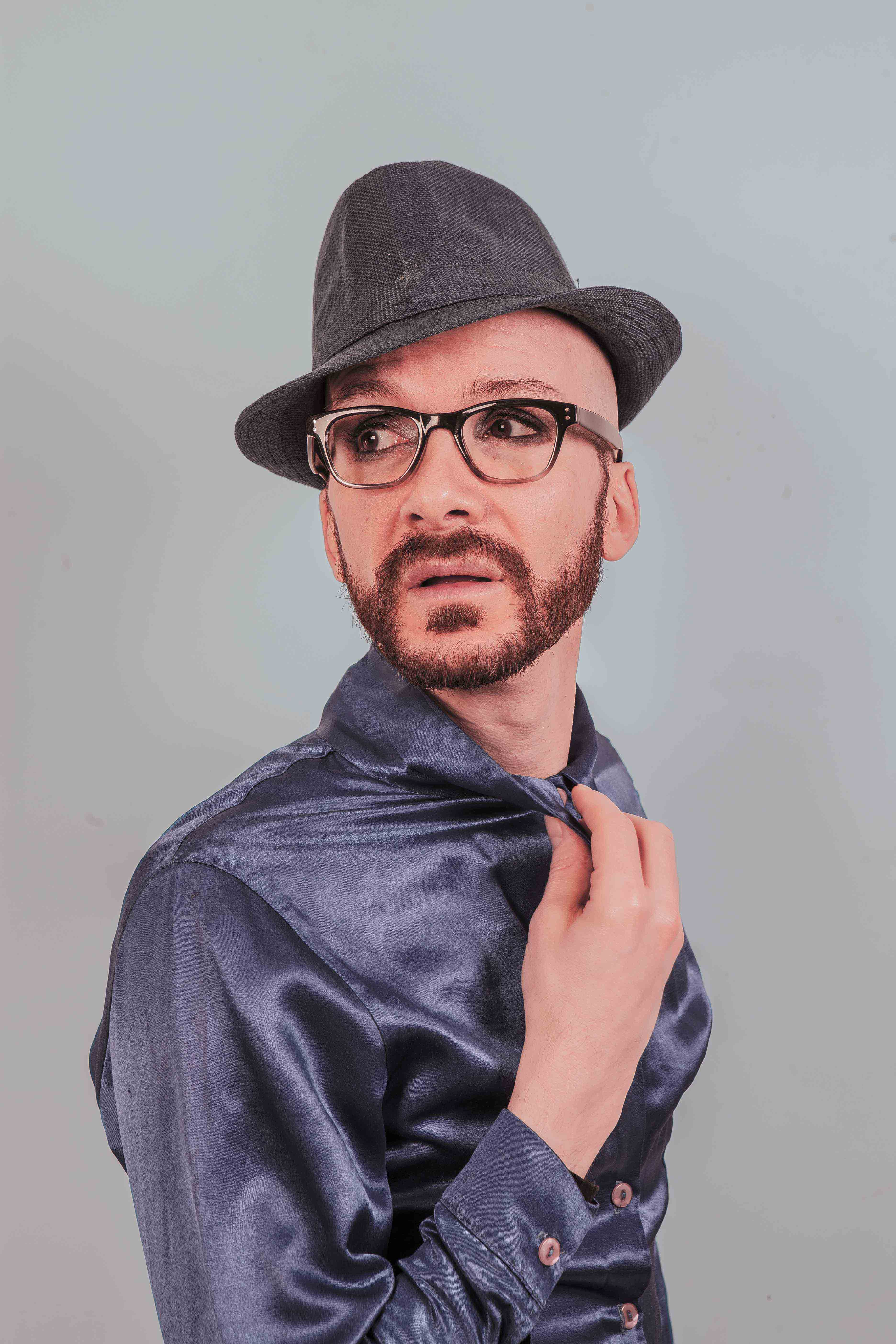 Shooting mit John Art